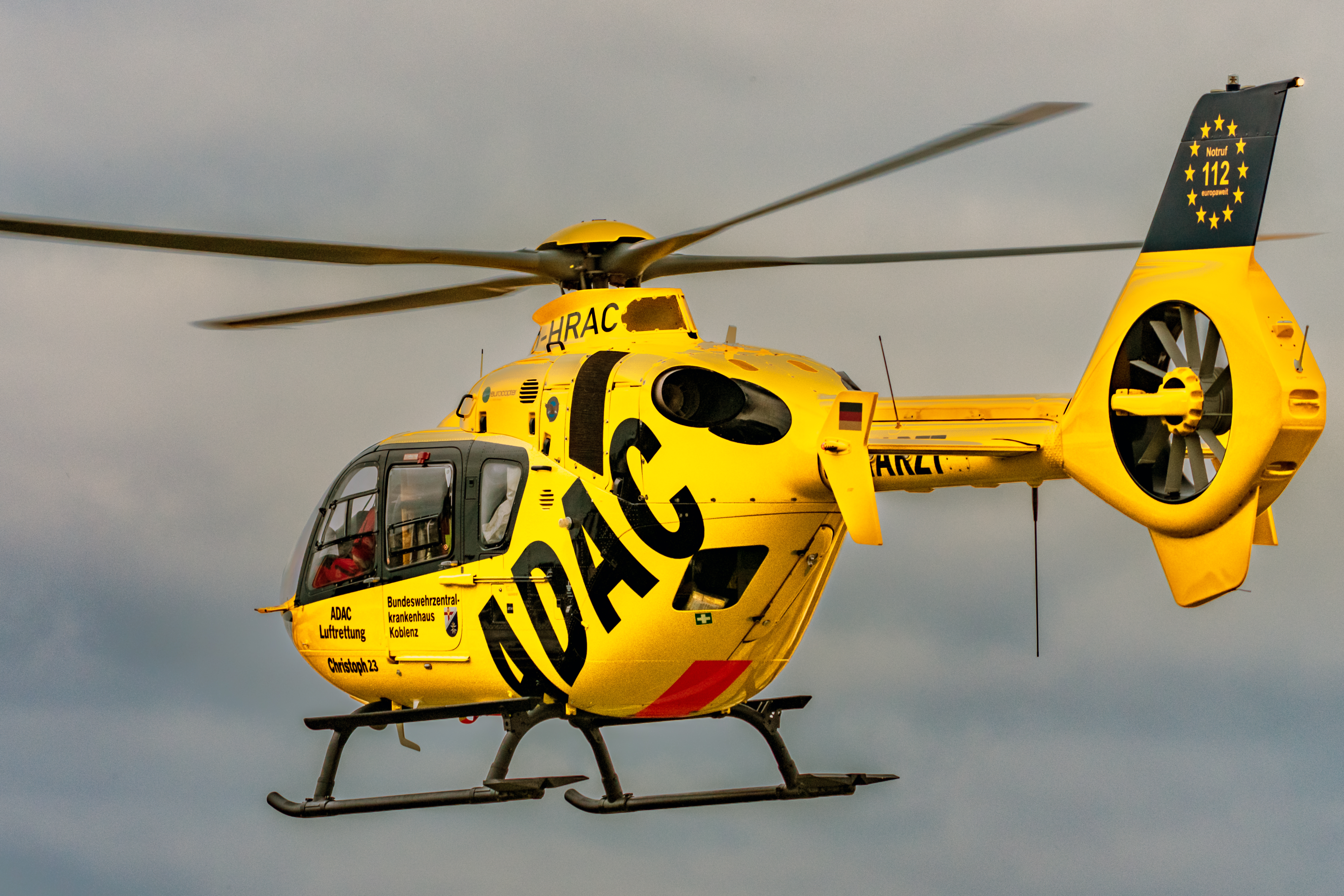 Der Rettungshubschrauber (Christoph 23) des Bundeswehrzentralkrankenhauses Koblenz mit der Kennung D-HRAC